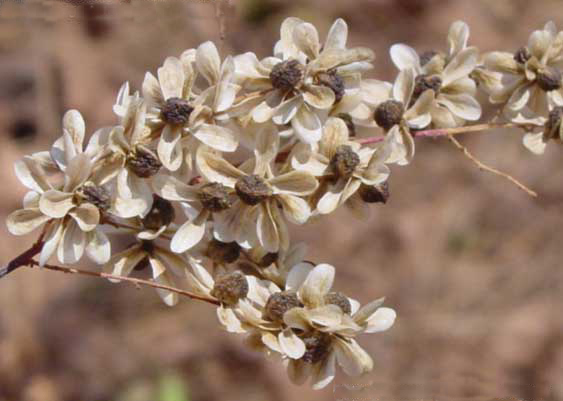 Frutos da aroeira-do-sertão (Myracrodruon urundeuva Fr. Allem.)